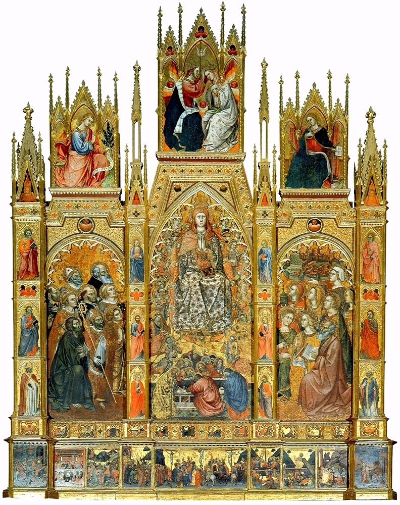 Altar